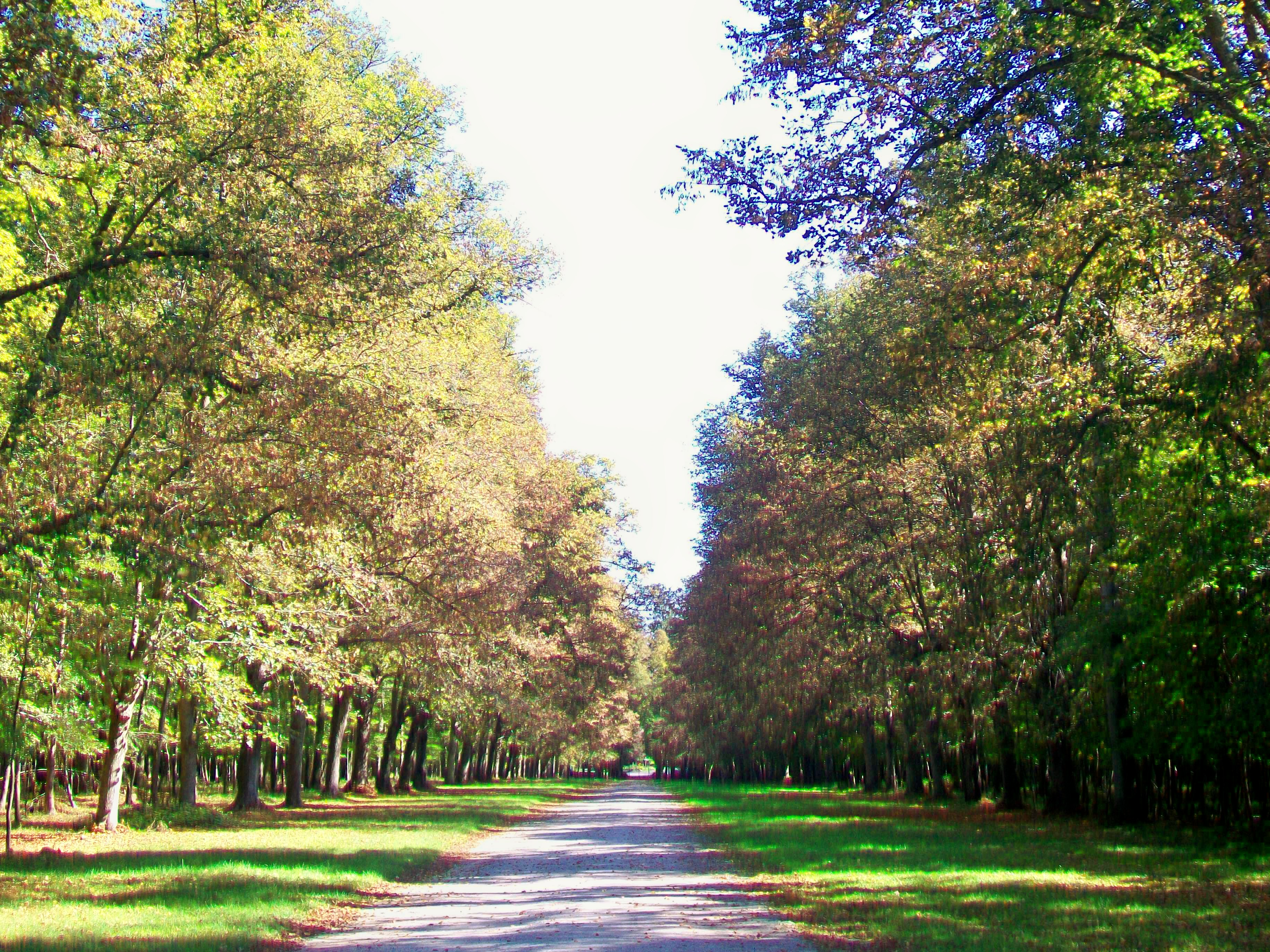 Au Petit Parc, la route d'Avilly, principal chemin du secteur, près de la grille d'Avilly à l'est.